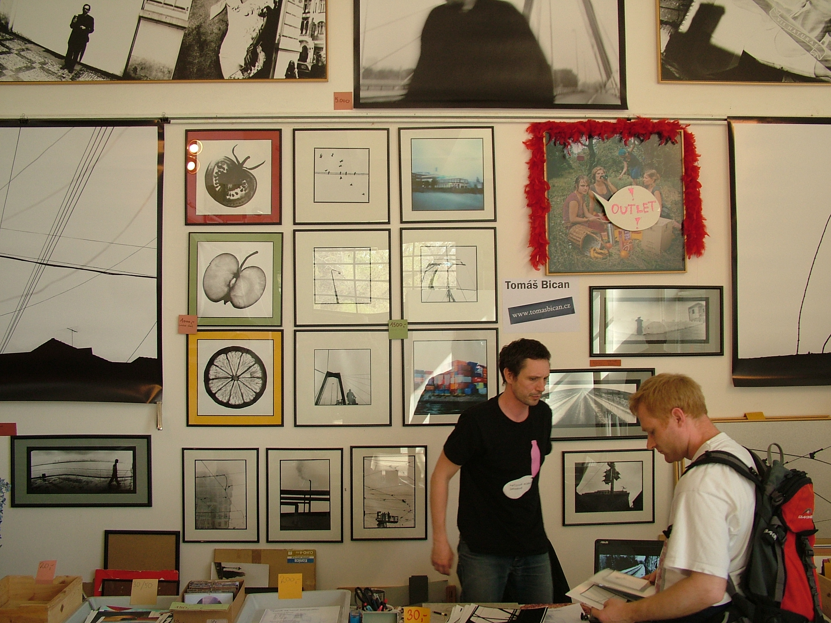 Výstava, festival, Prague Photo 2011 Budova: Mánes, Praha Trvání: od 4. dubna do 10. dubna 2011. Datum: 10. dubna 2011.